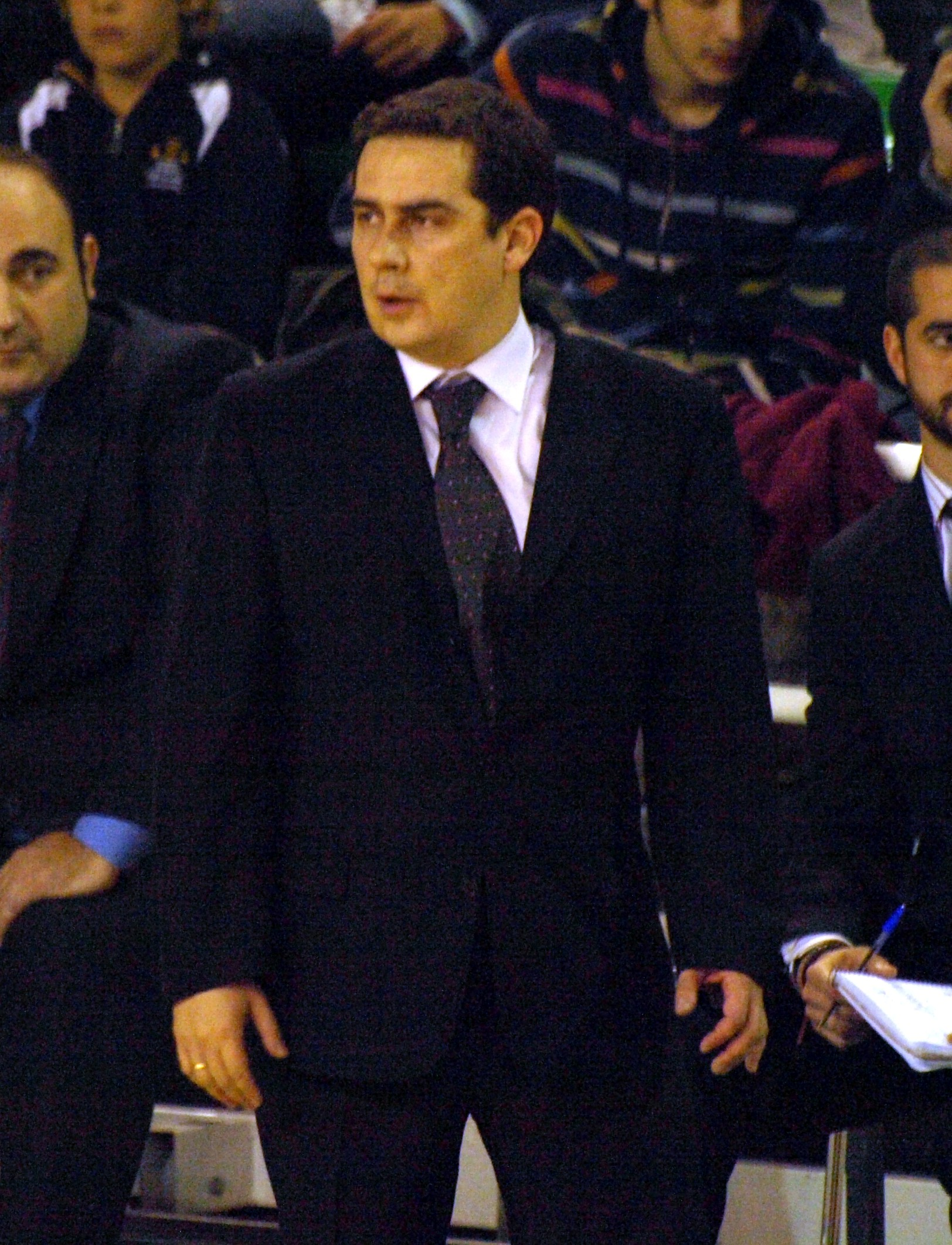 El entrenador de baloncesto Piti Hurtado durante un partido del Cáceres 2016 de la temporada 2007-2008